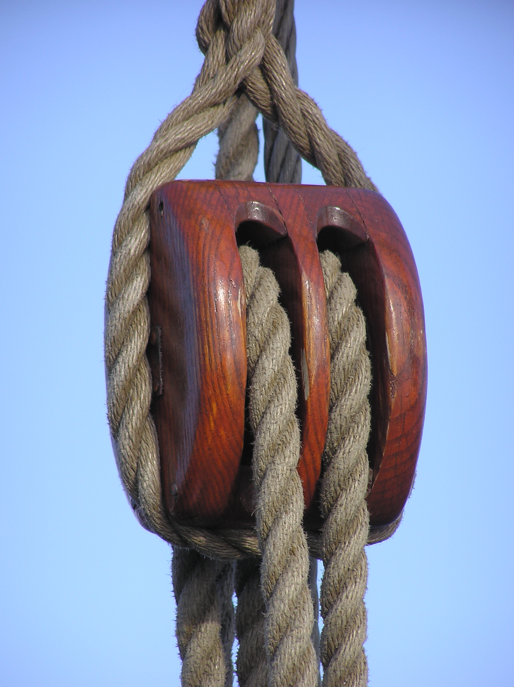 Talje